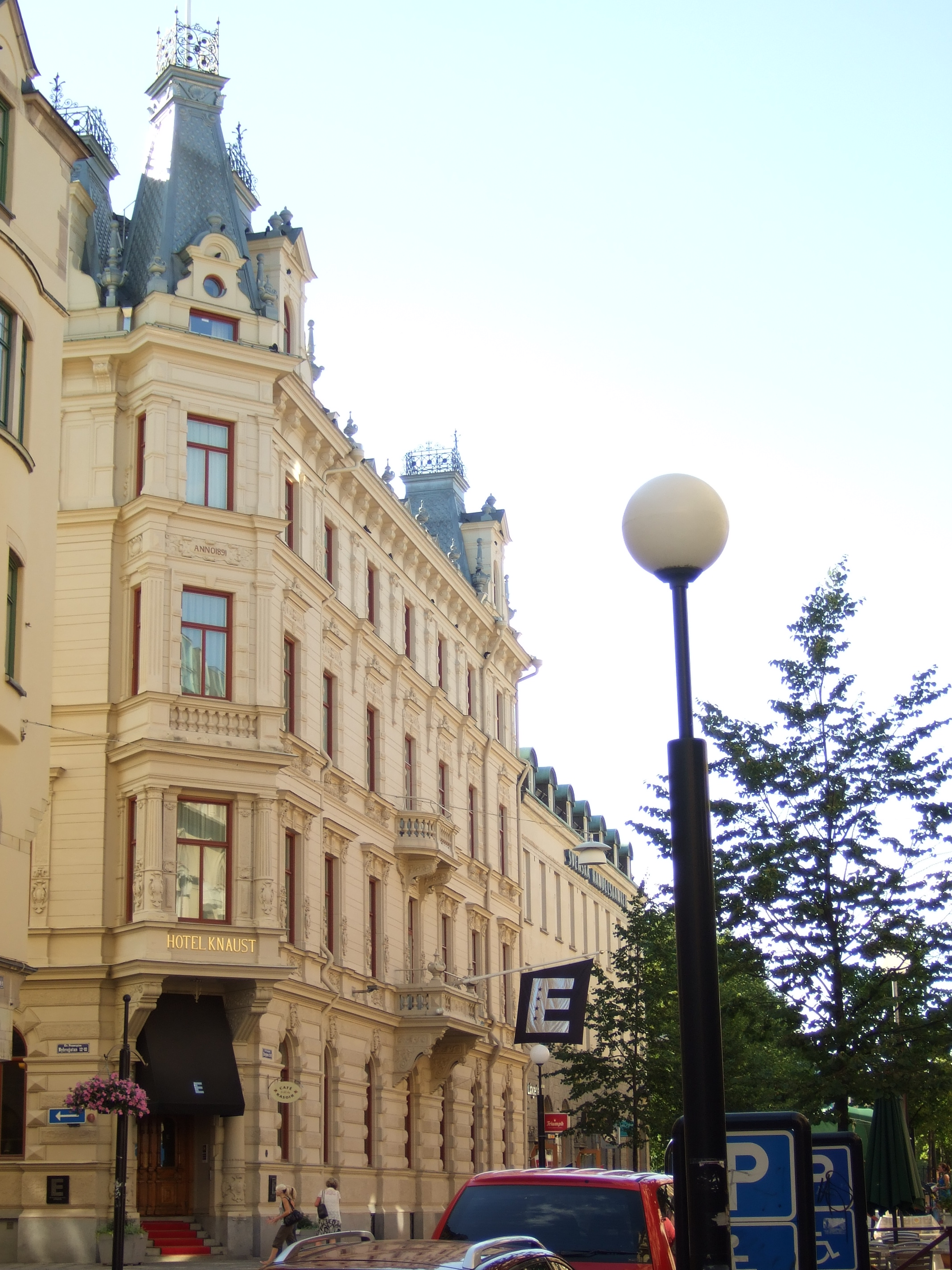 Hotel Knaust in Sundsvall, Sweden, viewed from east